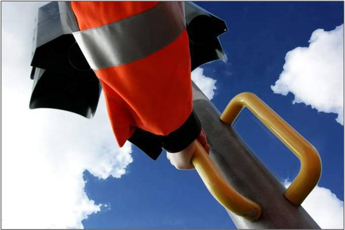 Marler Ampelgriff --JoeCoke 16:12, 25. Okt. 2010 (CEST)